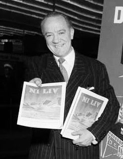 Arvid Nilssen. Klingenberg kino, interiør, innsamlingskampanje i forbindelse med filmen "Ni liv" til Krigsinvalidenes rekreasjonshjem, menn3, skuespillere.